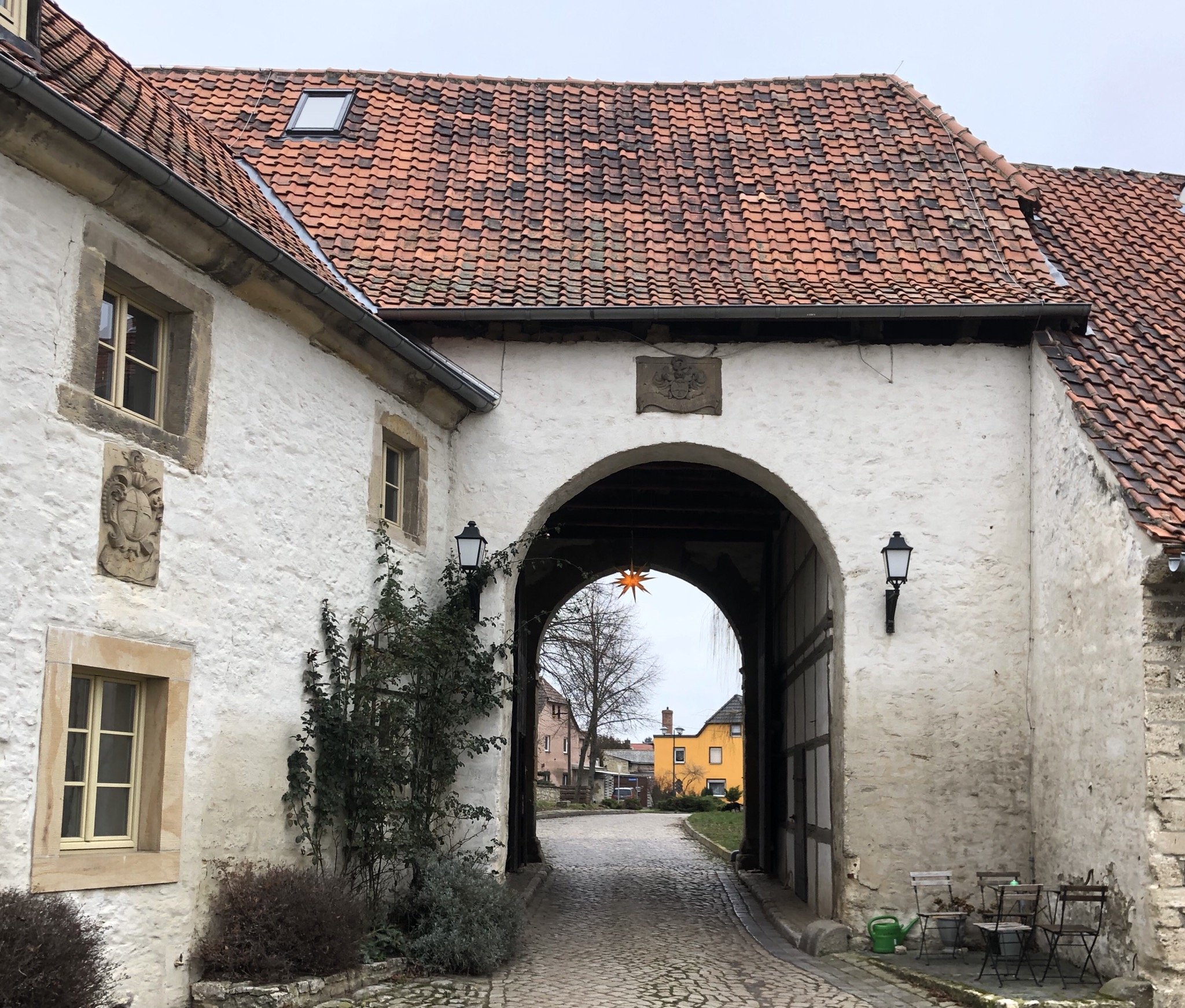 Kloster Hedersleben